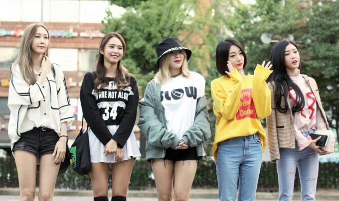 170915 KBS 뮤직뱅크 출근길 BP 라니아